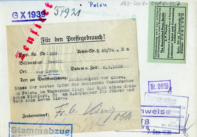 PK-Text und Zensurvermerke Abbildung der Rückseite von Foto Bild 183-2008-0415-507 Prop.Kp.Nr. 689 Archiv-Nr.: B49/7a.3a vor Crone 6.9.1939 Soldatengrab vor Crone. Eines der ersten Opfer des deutschen Vormarsches in Polen. Am Wegesrand liegt das Grab eines deutschen Pioniers, der am 2. September für Führer und Volks sein Leben liess. Bildberichter: Boesig Fr. OKW Freigegeben Hauptreferat Bildpresse Rückseite des Fotos "Bild 183-2008-0415-507" mit dem Bildbegleitzettel des Bildberichtes (Angaben zu Zeit, Ort, Fotograf, PK-Einheit und Bildinhalt). Rechts Stempel mit Freigabe des OKW. Darunter Stempel mit Freigabe des Hauptreferats Bildpresse im RMVP.